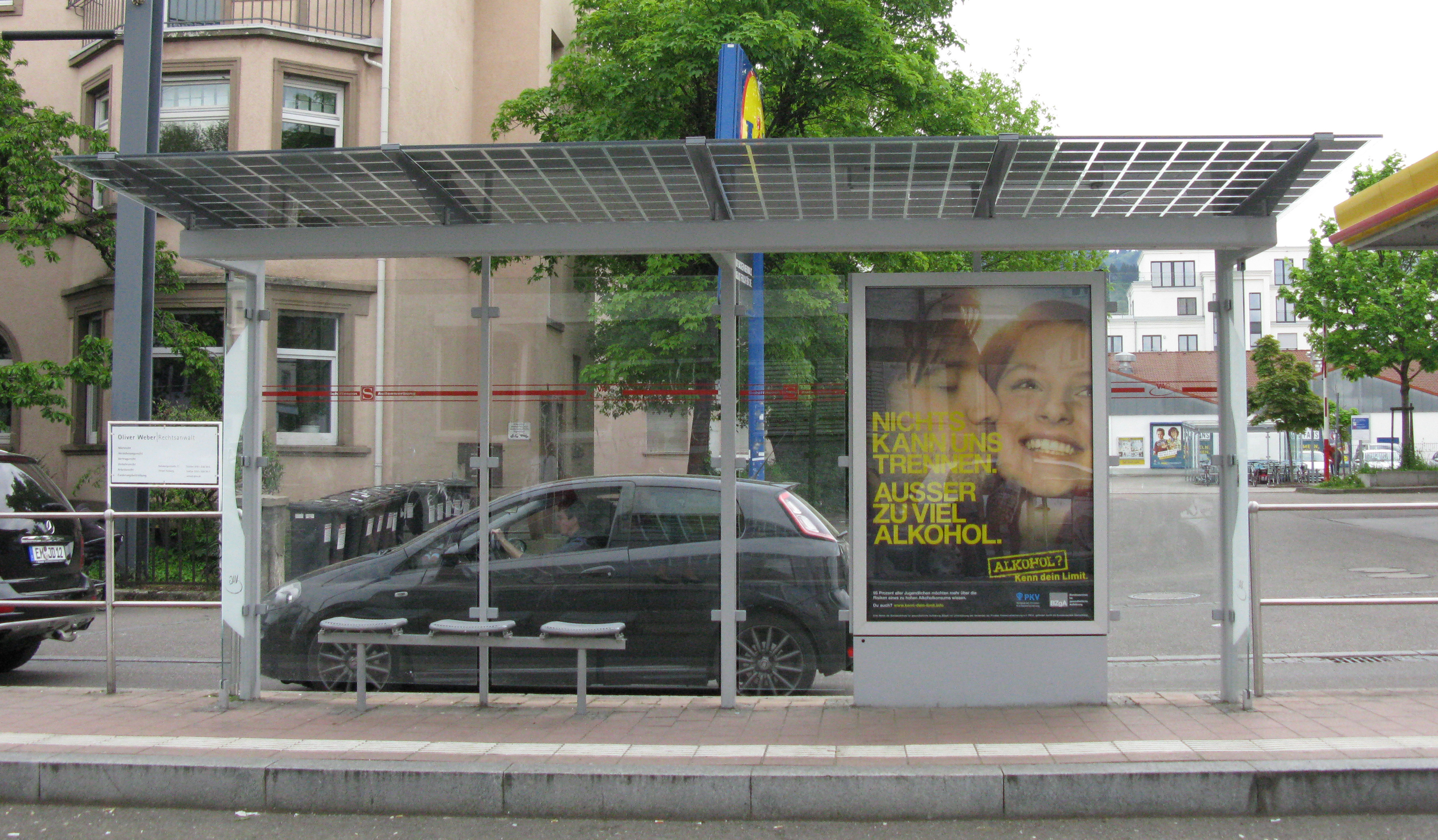 Wartehäuschen der Freiburger Verkehrs AG mit Fotovoltaikdach an der Haltestelle Okenstraße in Freiburg